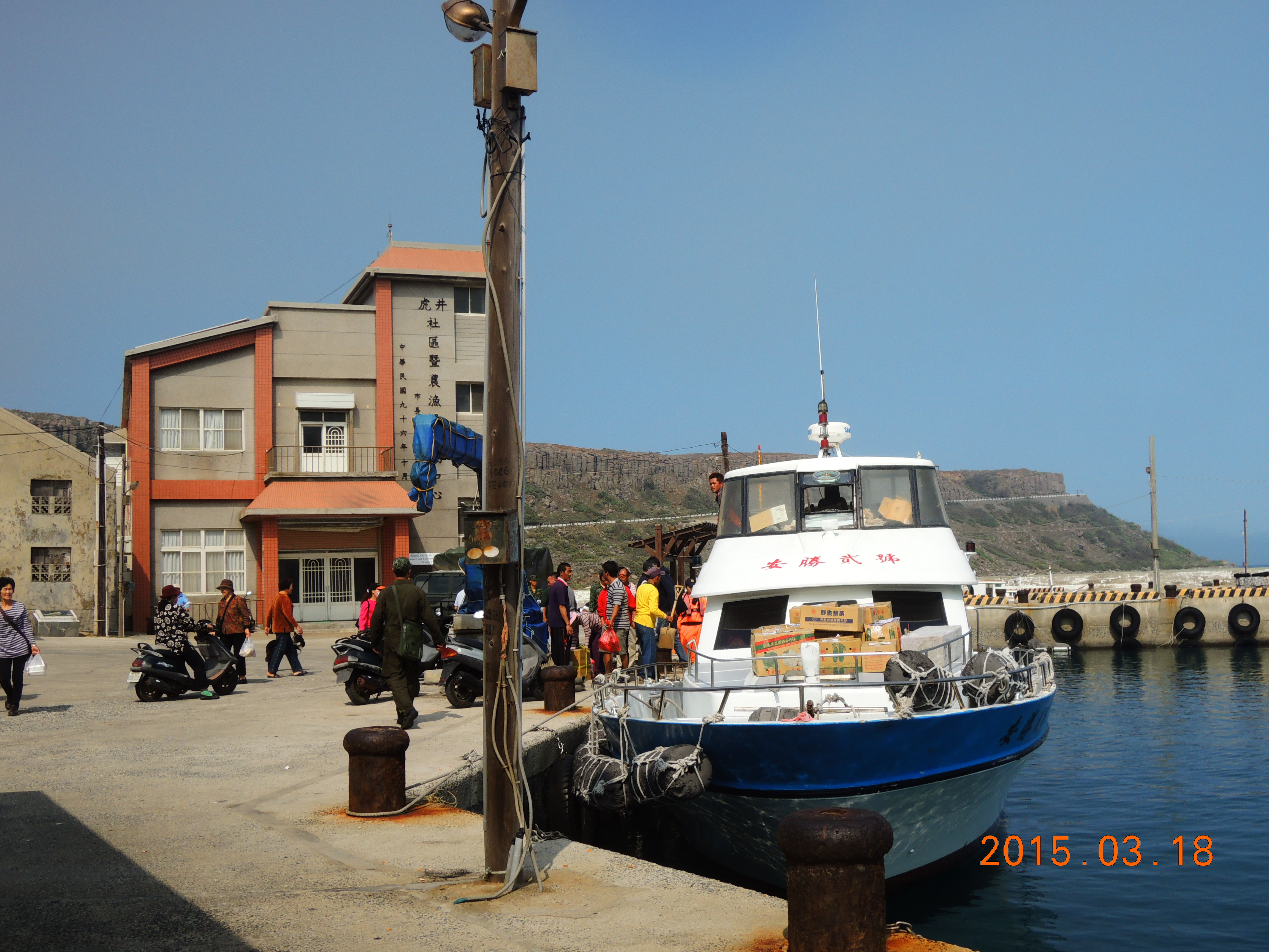 臺灣澎湖縣馬公市虎井里（虎井嶼）的漁港。